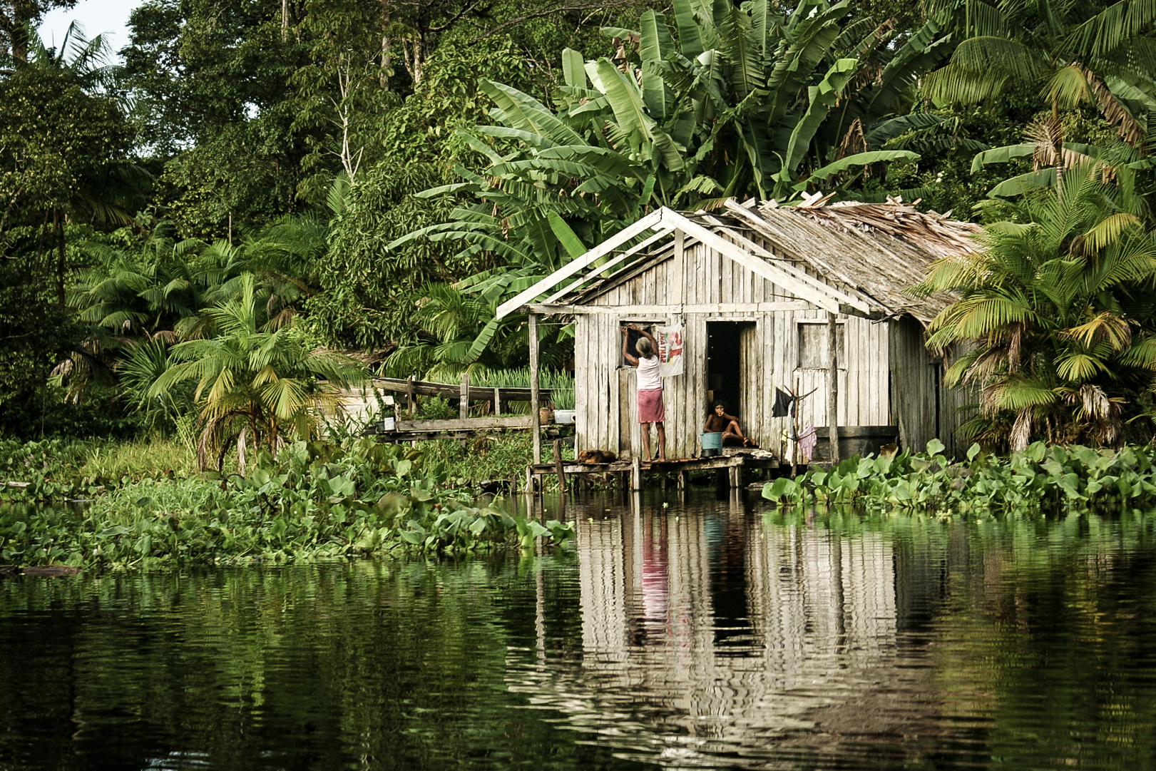 No ritmo da floresta, primeiras tarefas da manhã, Parque Estadual Charapucu, município de Afuá Pará.